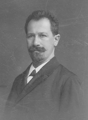 Arnošt Vilém Kraus (1859 - 1943), Český univerzitní profesor germanistiky a literární historik.